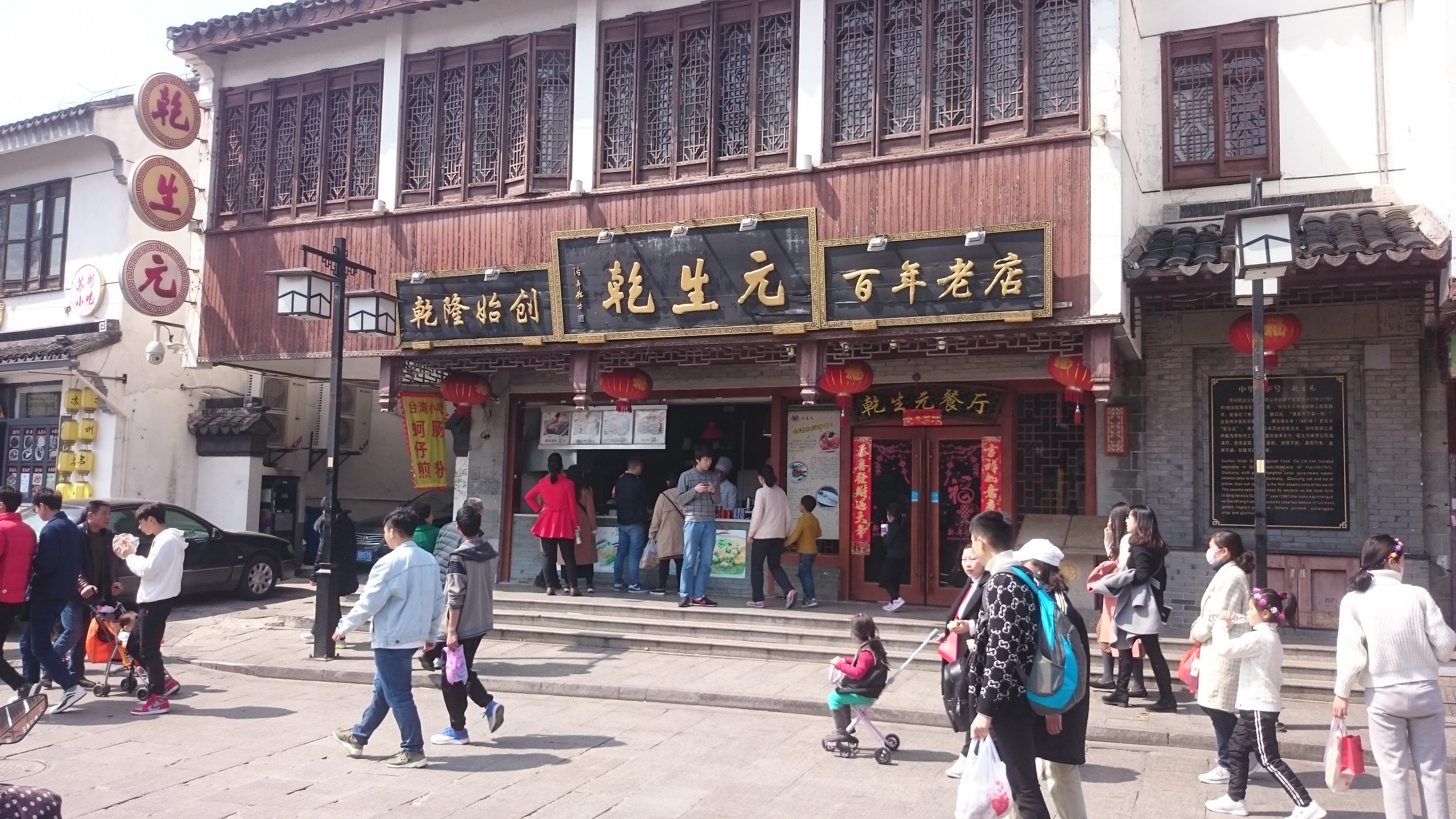 乾生元酒店 山塘店